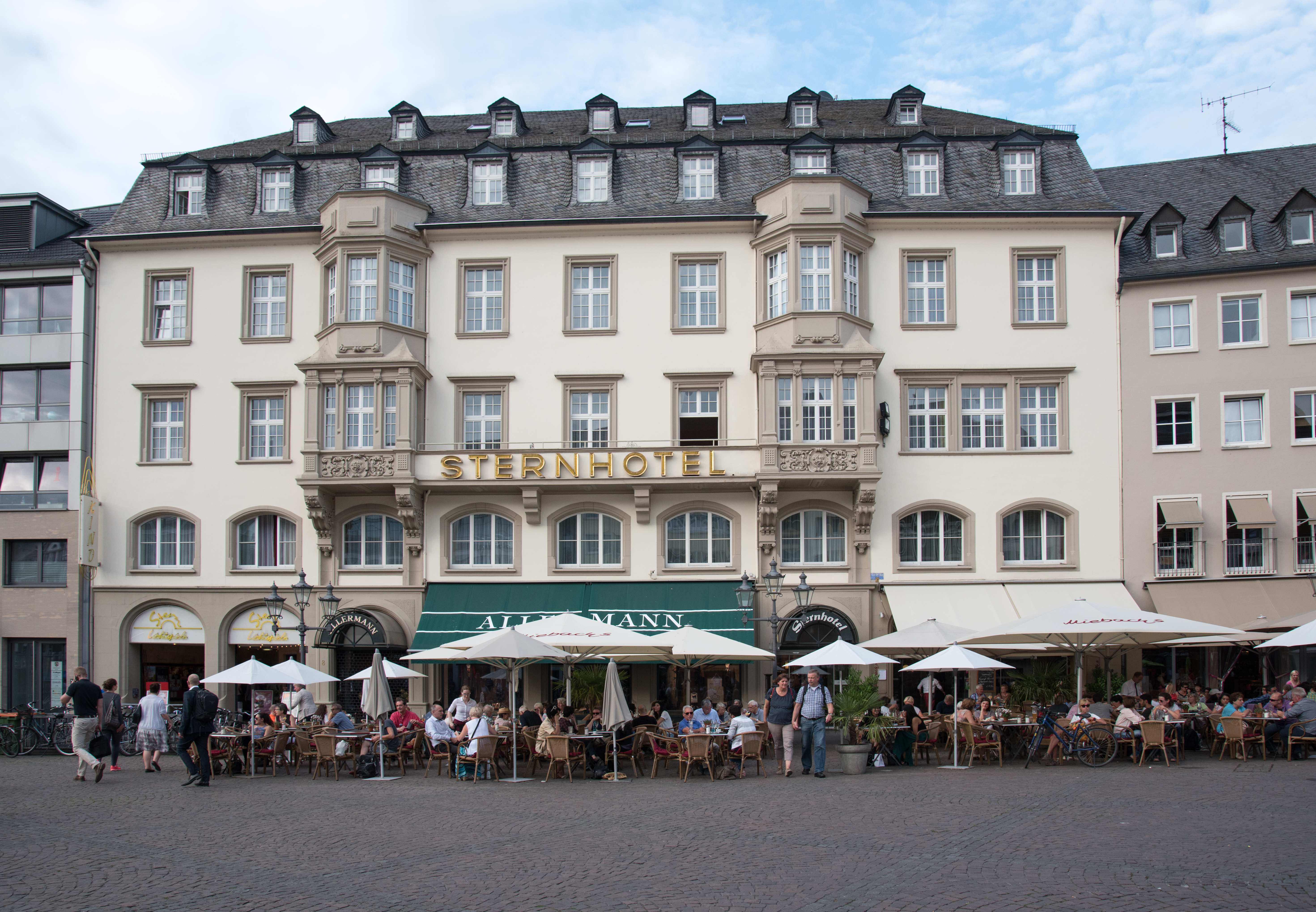 Bonn, Markt 8